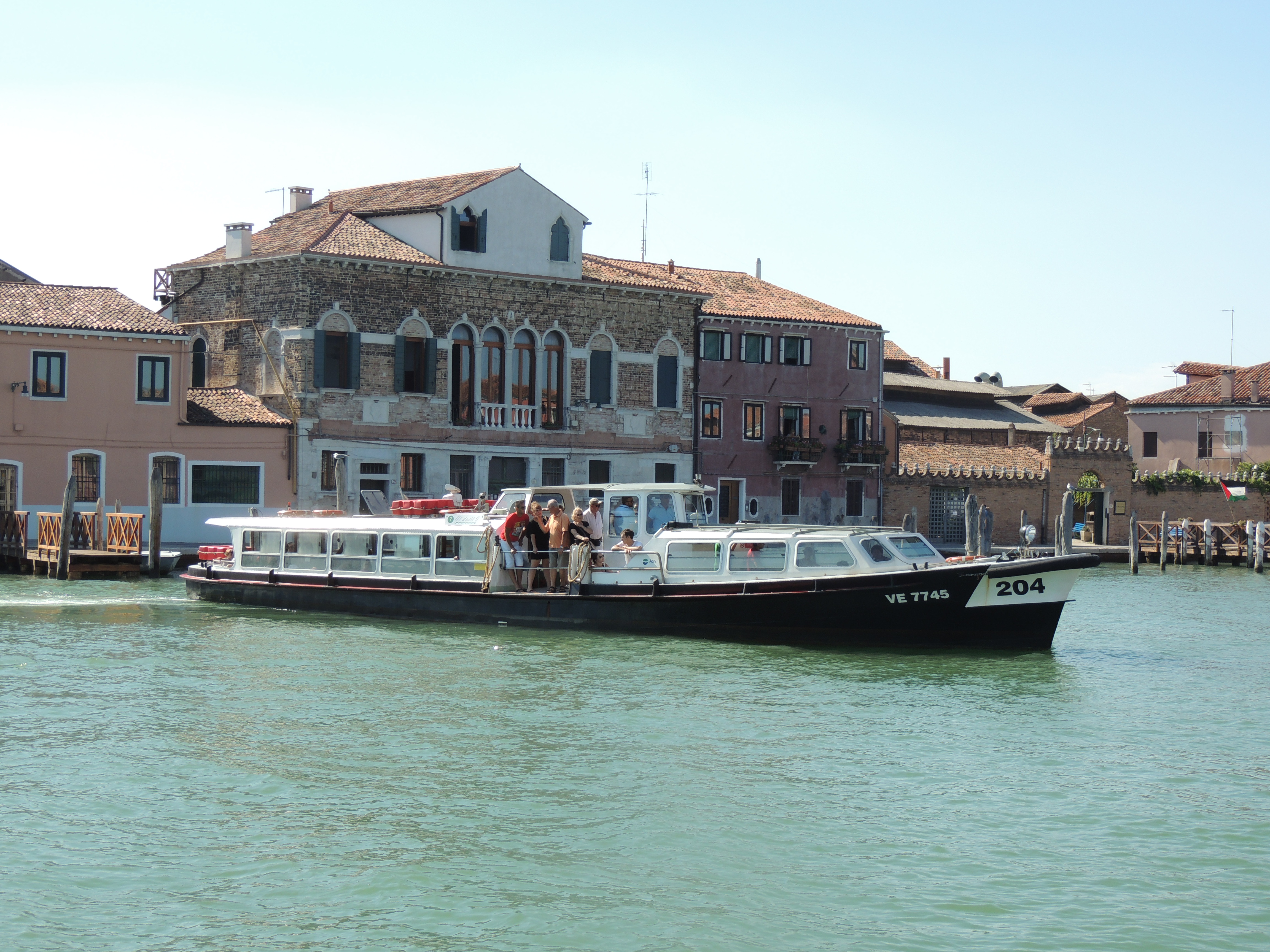 motoscafo